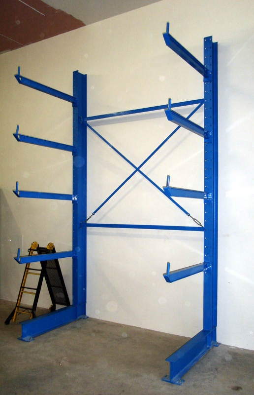 Konzolový regál